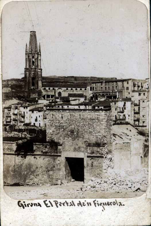 Fotografia antiga de la Porta de Figuerola de la Muralla del Mercadal de Girona.